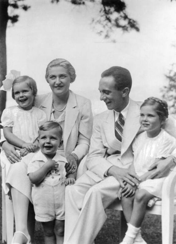 Magda und Joseph Goebbels mit Kindern 13518-37